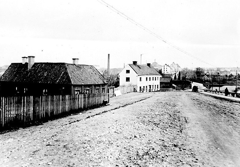 Götgatan vid Skanstull med Grundsborg och tullhuset (det vita)